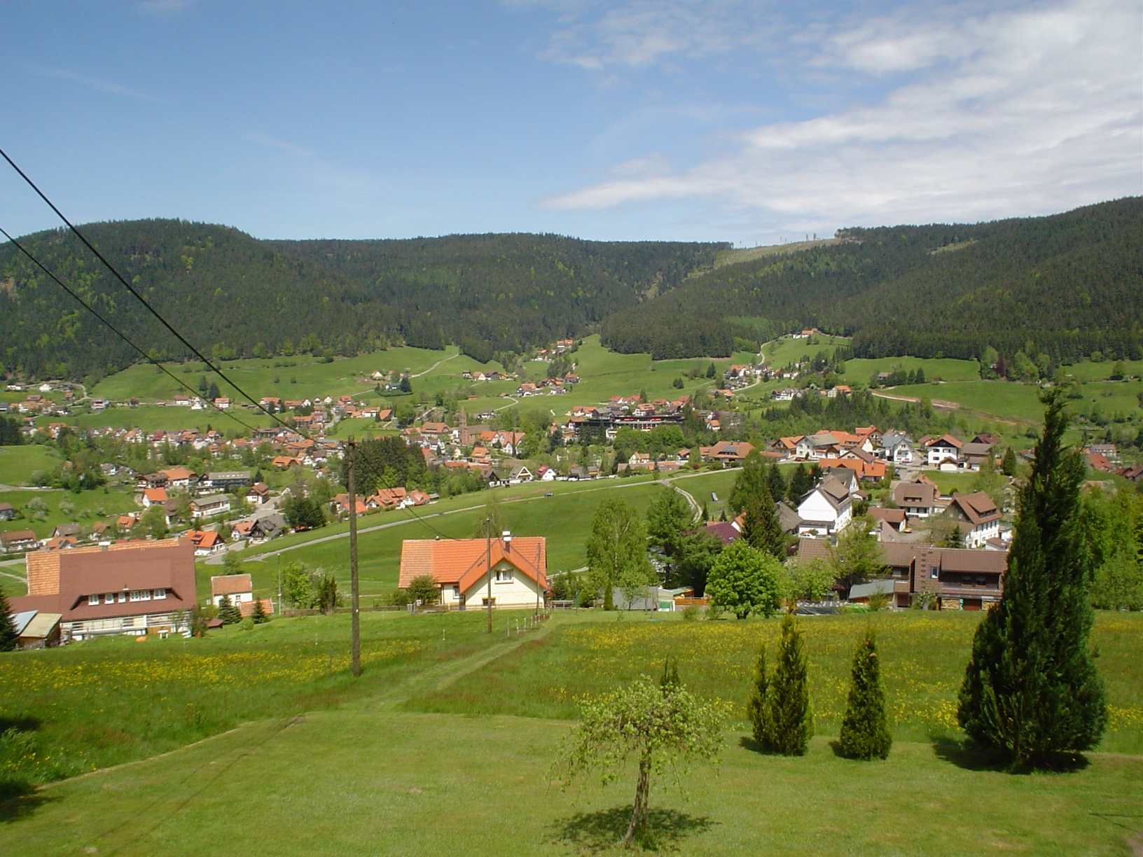 Blick auf Mitteltal von der Winterseite aus